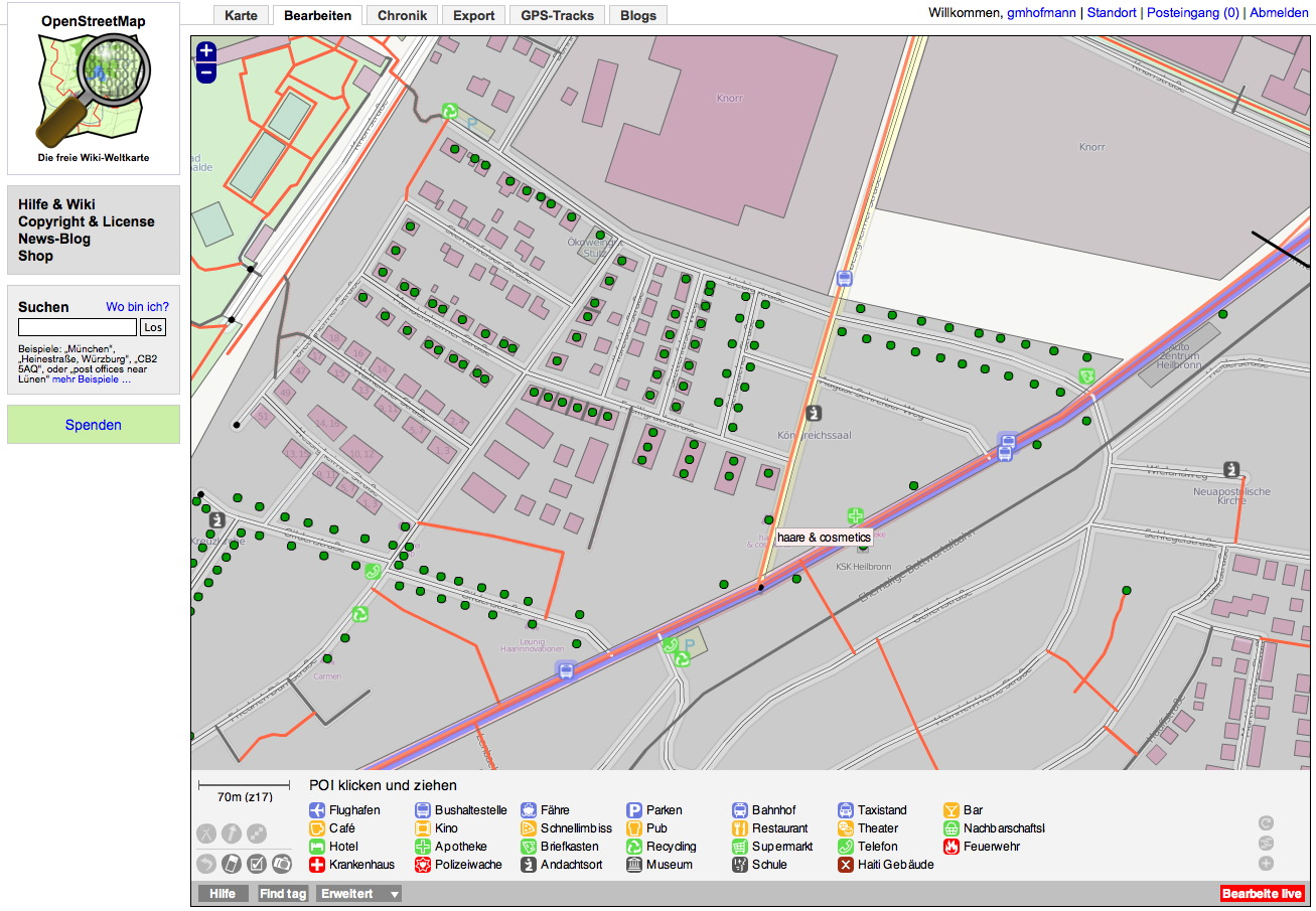 Screenshot des OSM-Online-Editors Potlatch